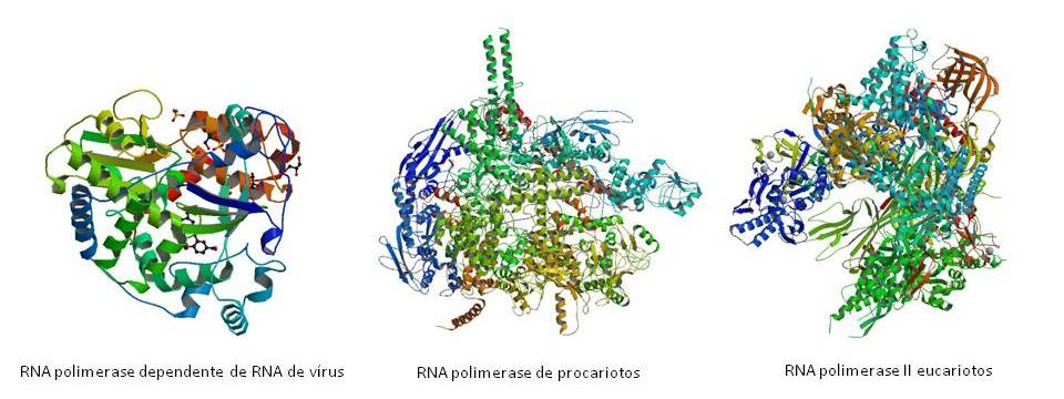 Estruturas das RNA polimerases de eucariotos (polimerase II), procariotos e virus